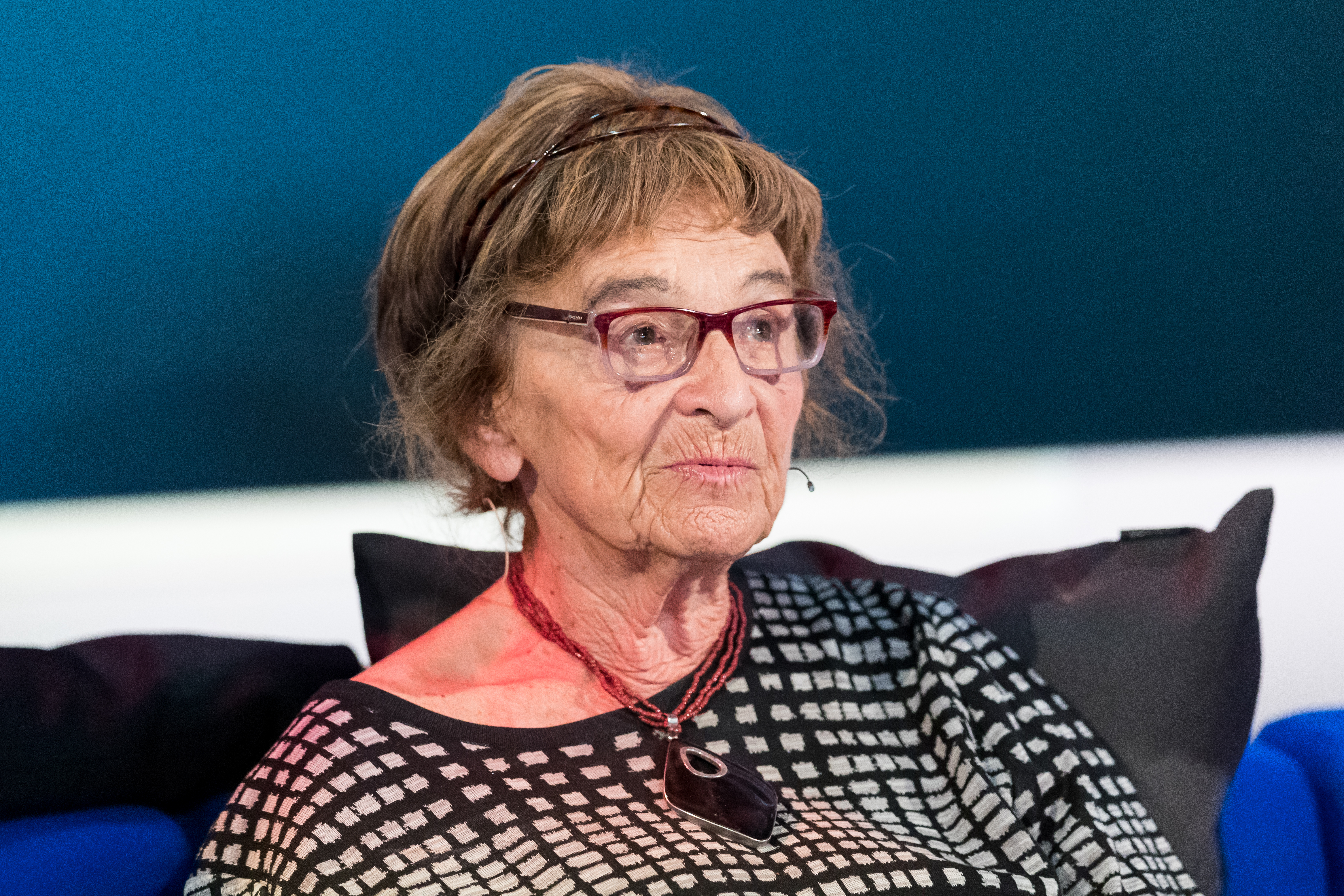 Ágnes Heller during Frankfurter Buchmesse at Messe Frankfurt, Frankfurt, Hessen, Germany on 2018-10-13, Photo